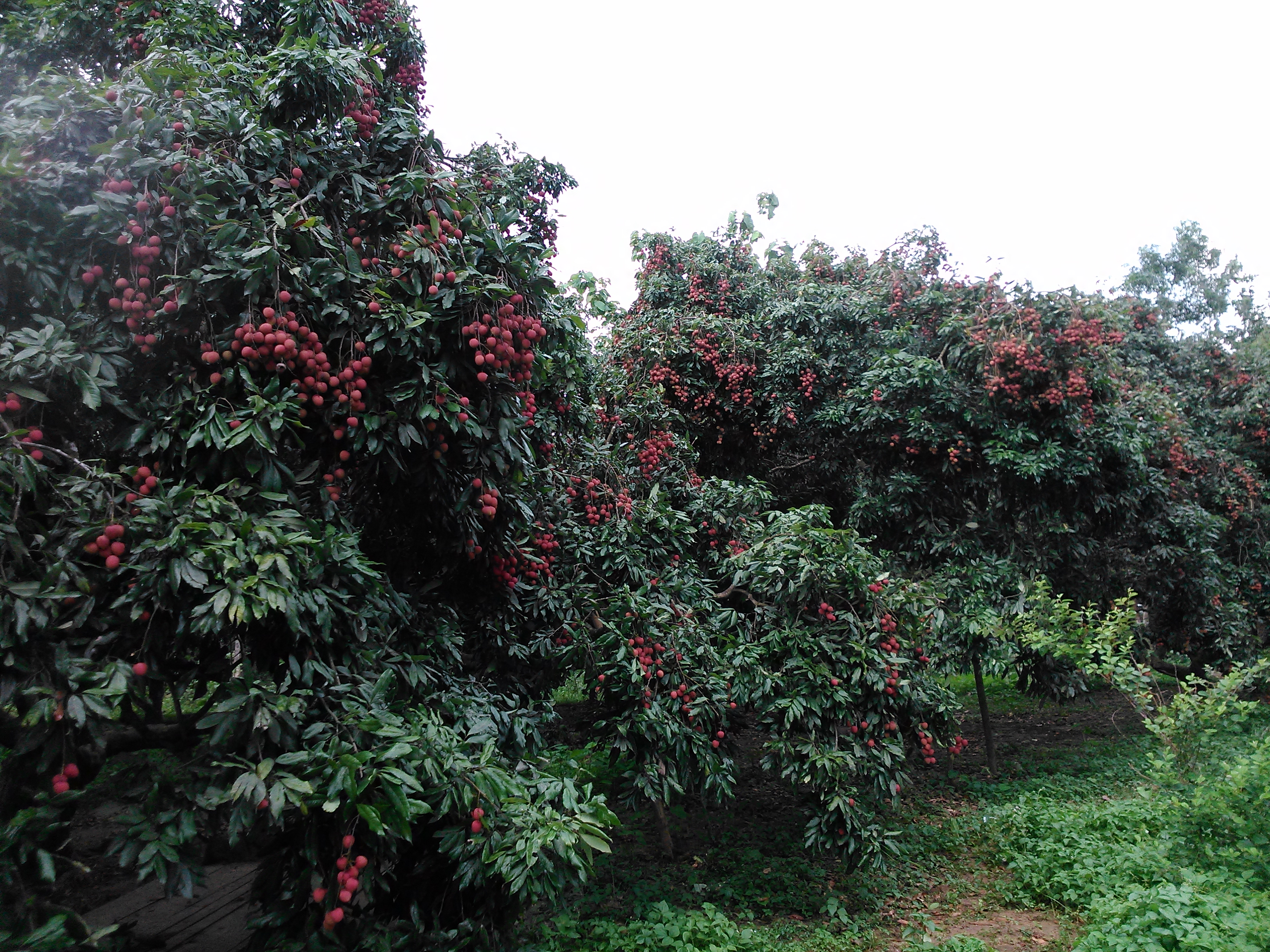 ব্রাহ্মণবাড়িয়ার বিজয়নগর উপজেলার লিচু বাগান